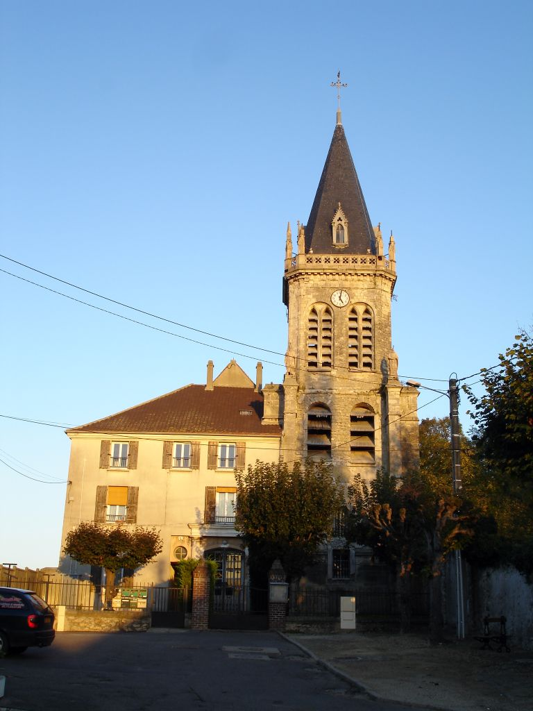 L'église de Thieux, Seine-et-Marne (France) - Novembre 2006 Photo personnelle de clicsouris